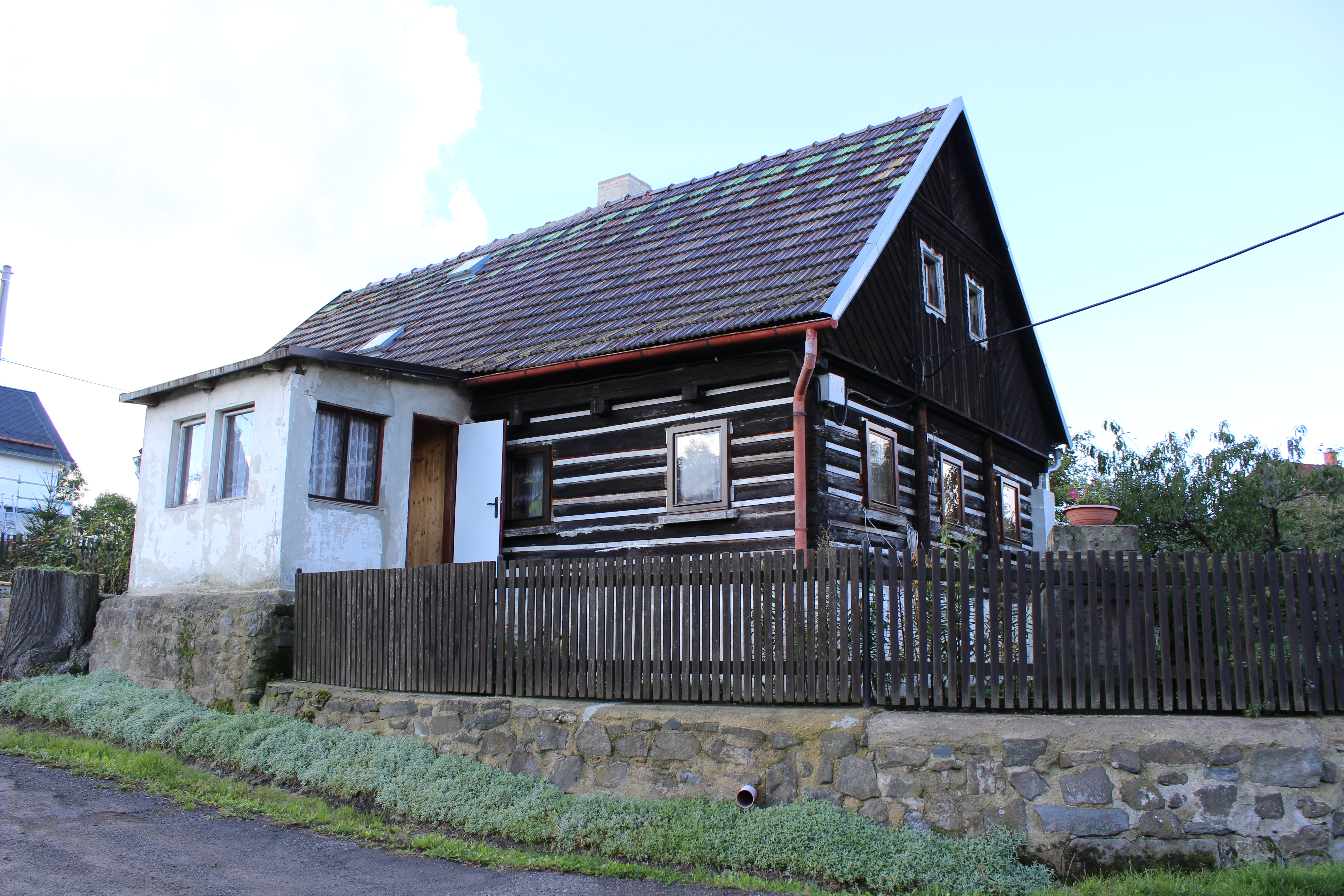 Dům číslo popisné 39 v Brložci, části Dobrné.